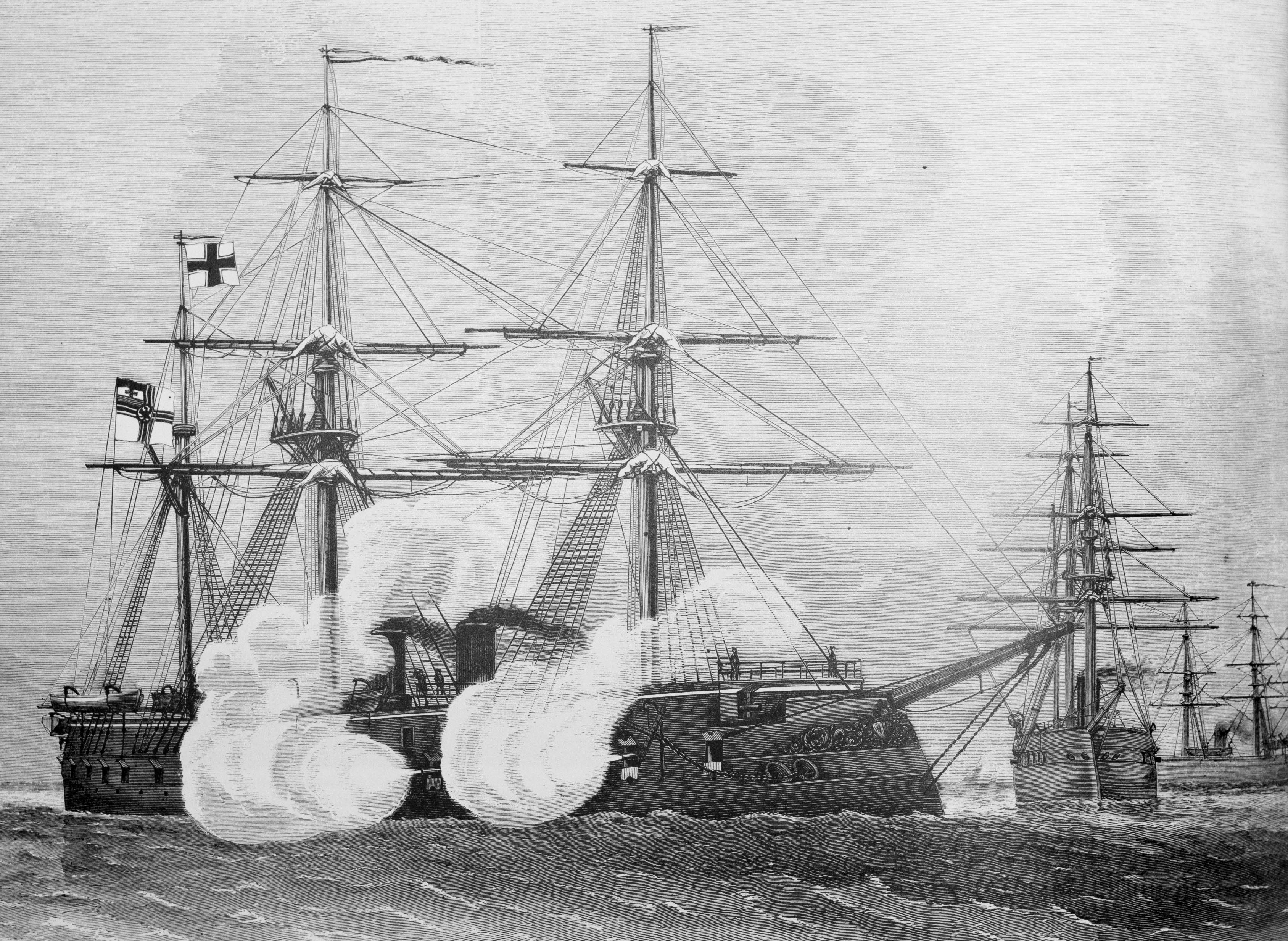 Das deutsche Übungsgeschwader auf der Danziger Reede, von links nach rechts Kronprinz, Friedrich Carl und Ariadne.